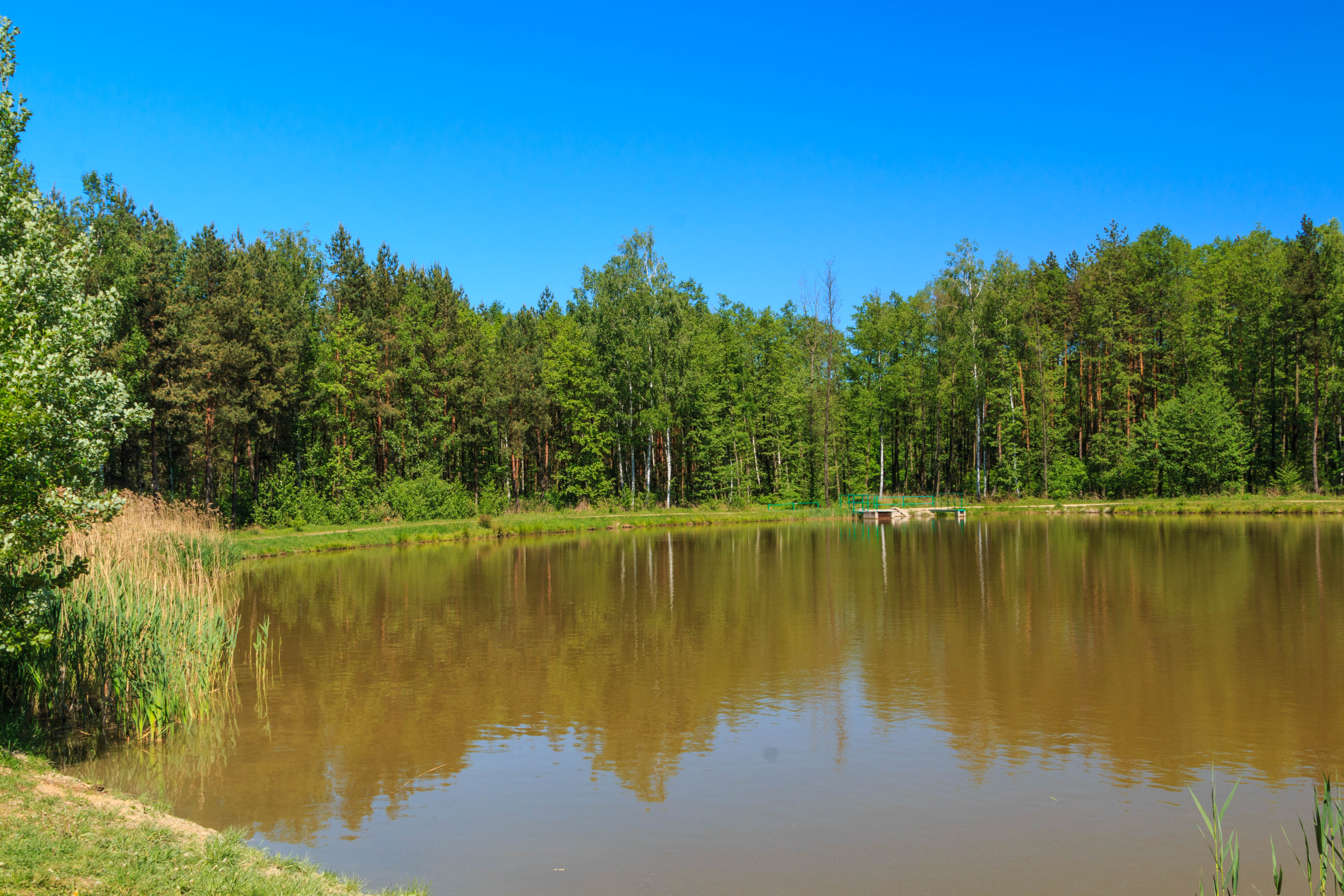 Rybník Češík Project: Vodstvo.